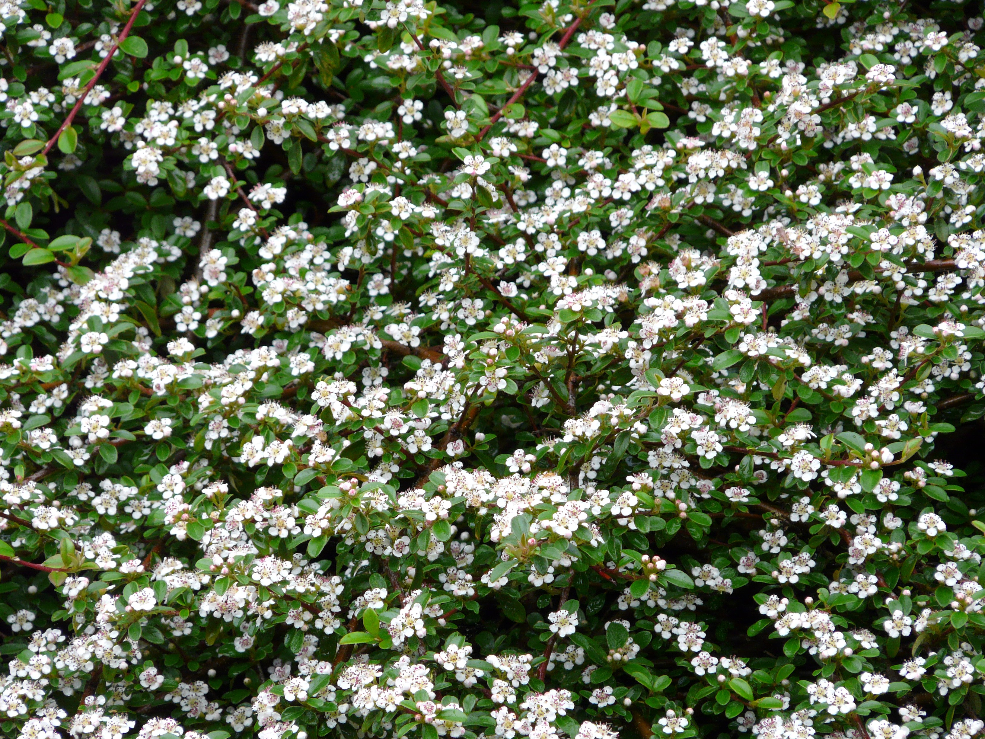 Cotoneaster dammeri en fleurs, Dordogne, France.